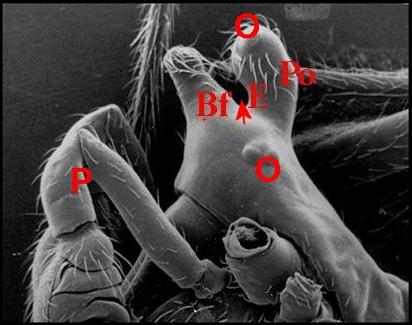 Prosoma d' Argyrodes zonatus. Vue latérale. Microscope à balayage.